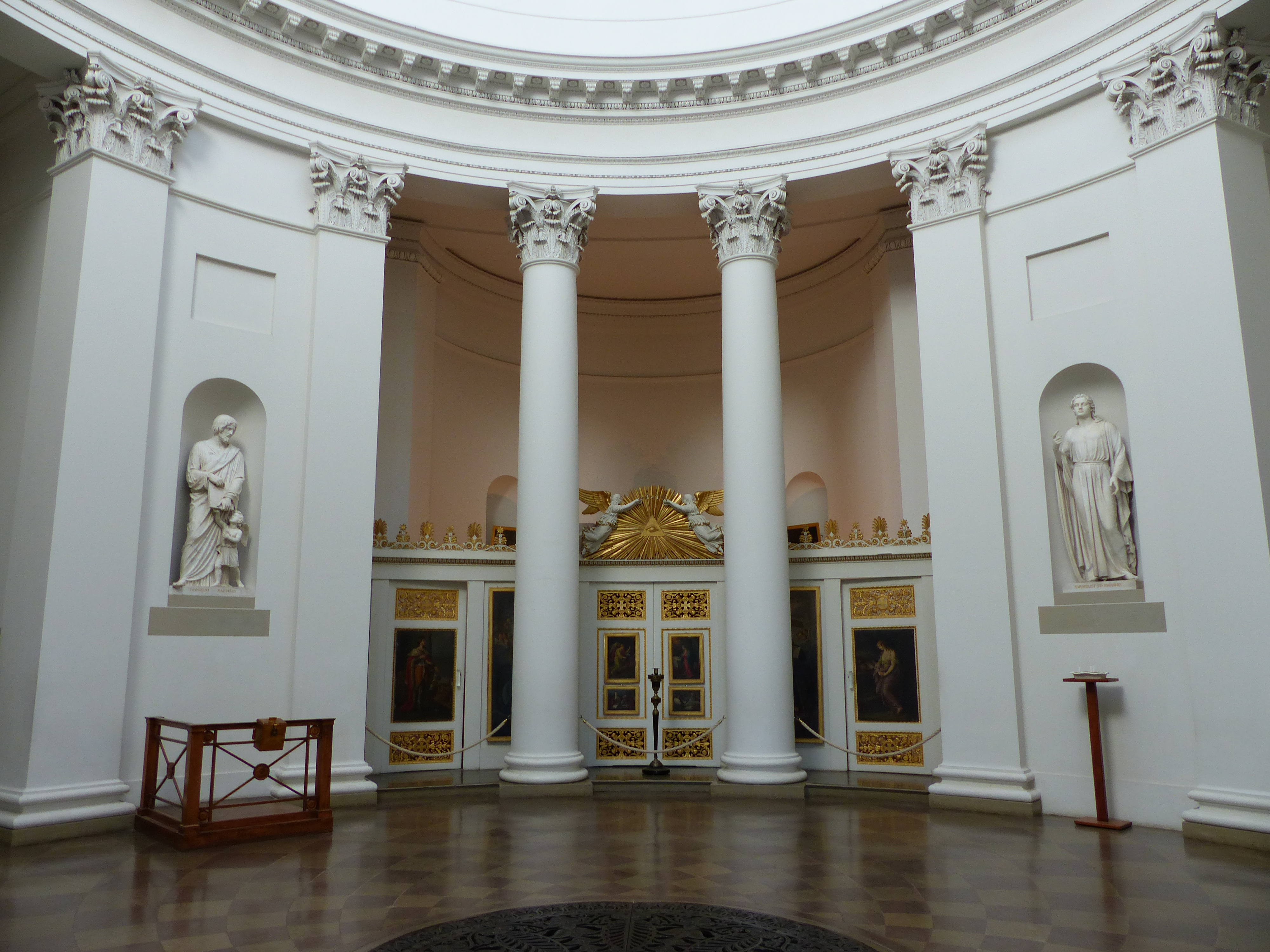 Grabkapelle auf dem Württemberg